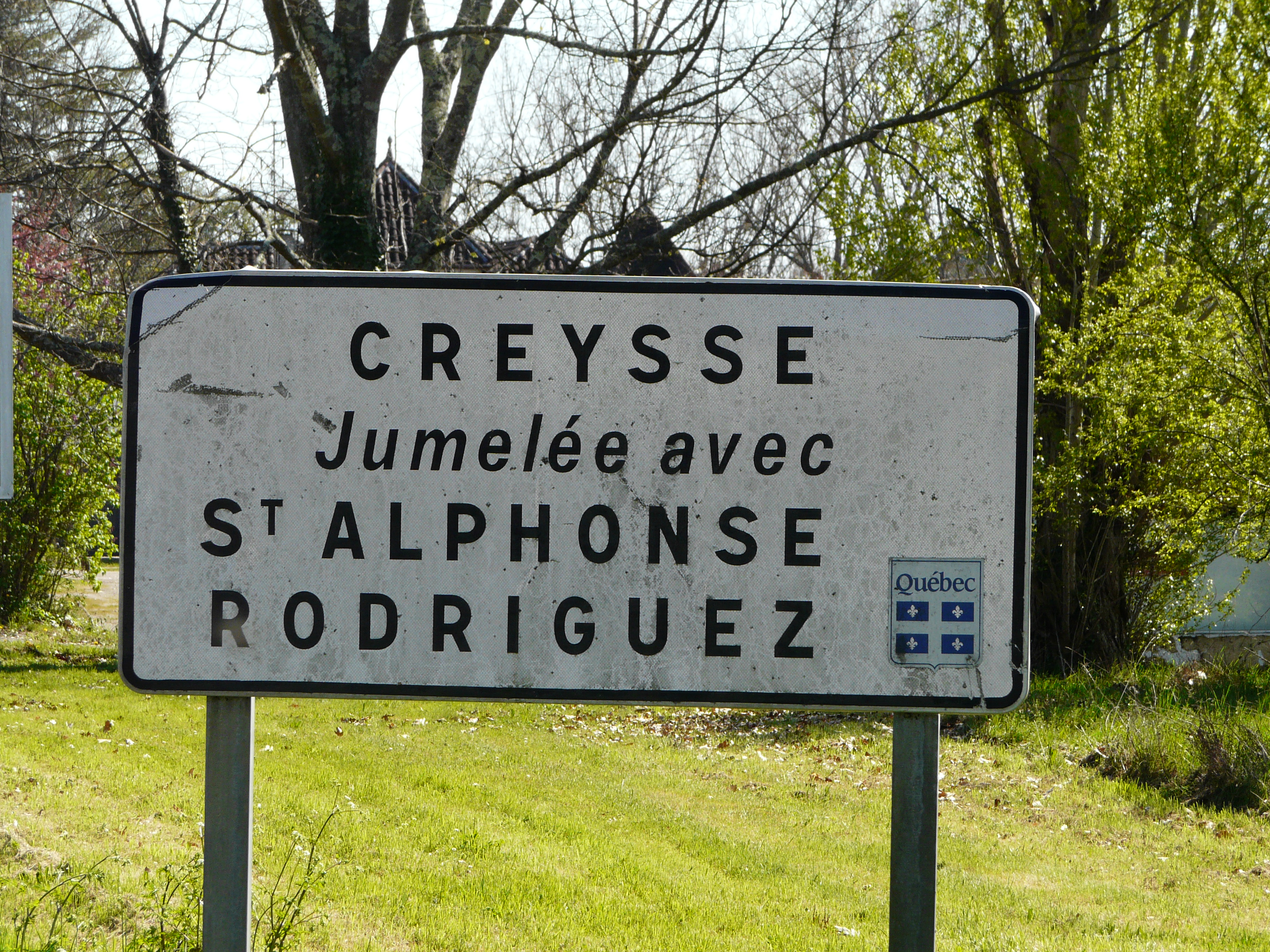 Panneau de jumelage de Creysse, Dordogne, France.